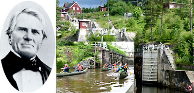 Bildemontasje laget av Bård Halvorsen sammensatt av hans egne bilder i farge samt et historisk bilde av Engebret Soot, som finnes blant annet i Halden Arbeiderblads fotoarkiv. Soot døde 70 år før nevnte avis ble til i 1929.